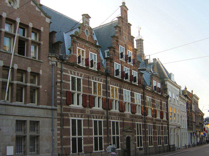 Building of the "Hoogheemraadschap Rijnland", Leiden